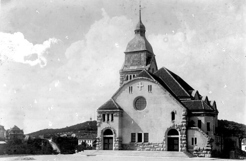 China, Tsingtau, Christuskirche China, Tsingtau (Qingdao) Evangelische Christuskirche (Protestant Christ Church)